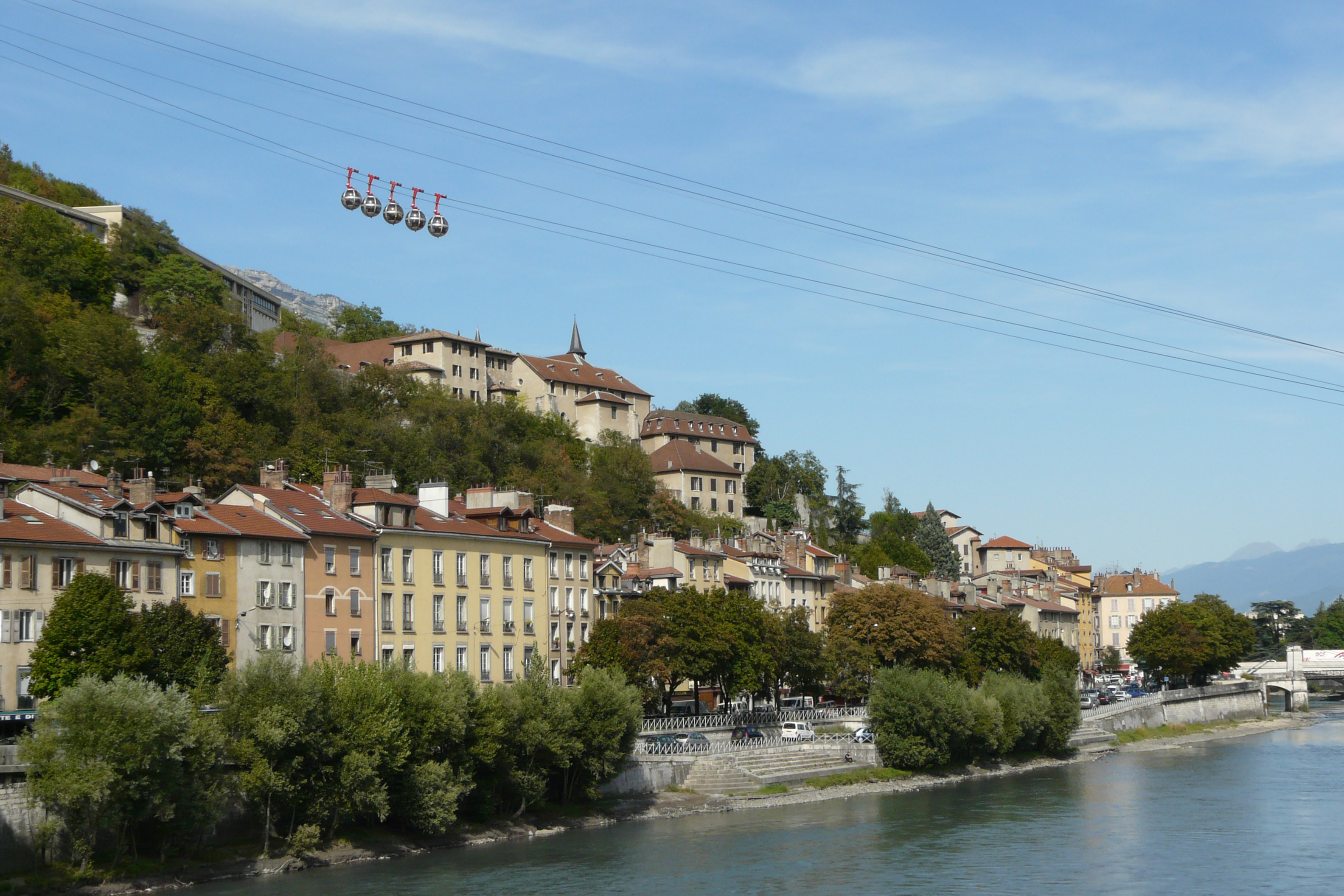 Téléphérique de la Bastille et la Rive droite de l'isère à Grenoble